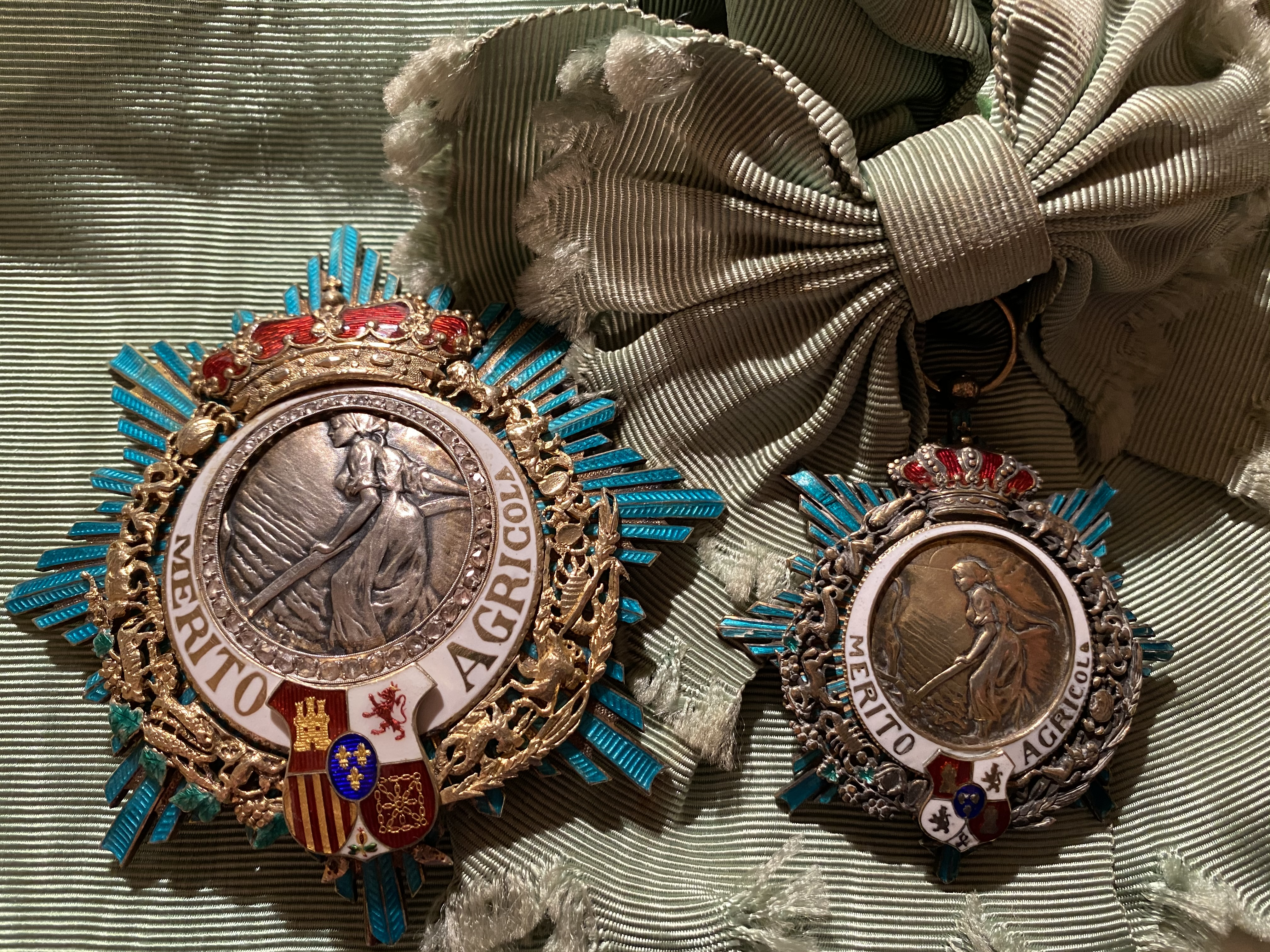 Gran Cruz de la Orden del Mérito Agrícola, Reino de España. Modelo 1905-1931. AEA Collections.